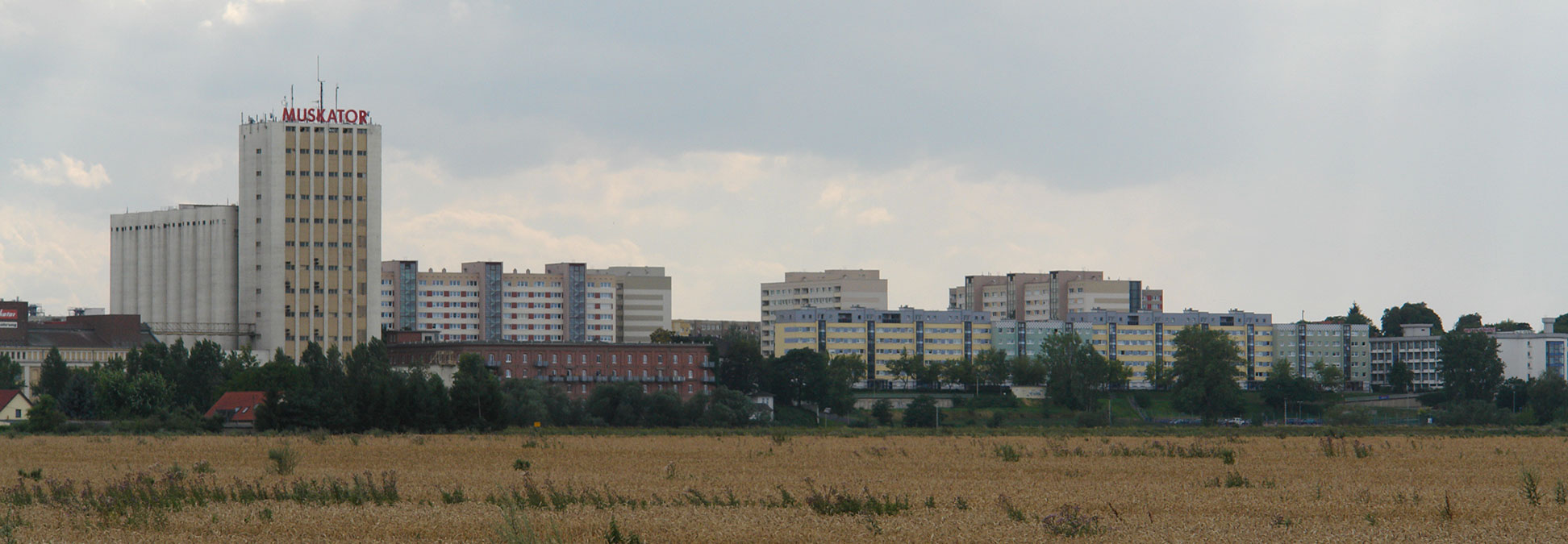 Blick auf Riesa mit dem Muskator Tierfutter-Werk